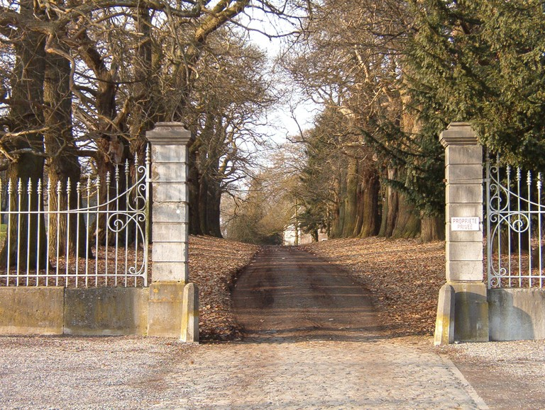 allée chateau aineffe